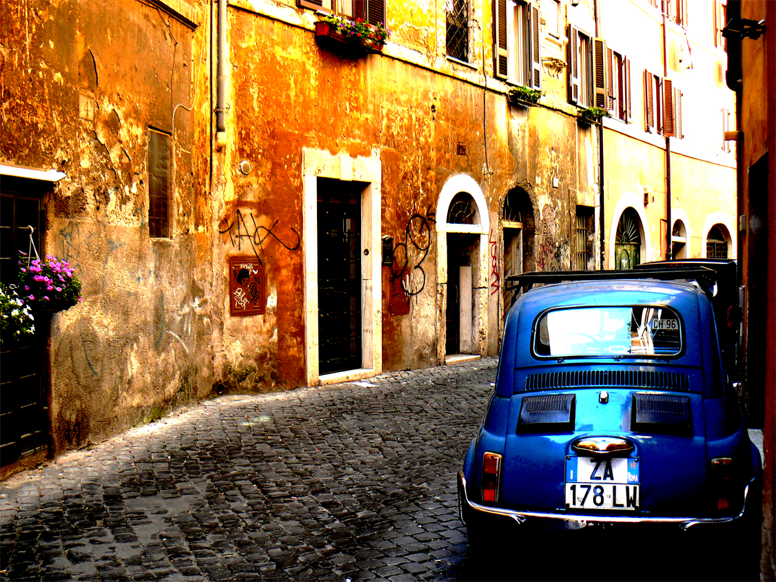 Roma,ItaliaTrastevere